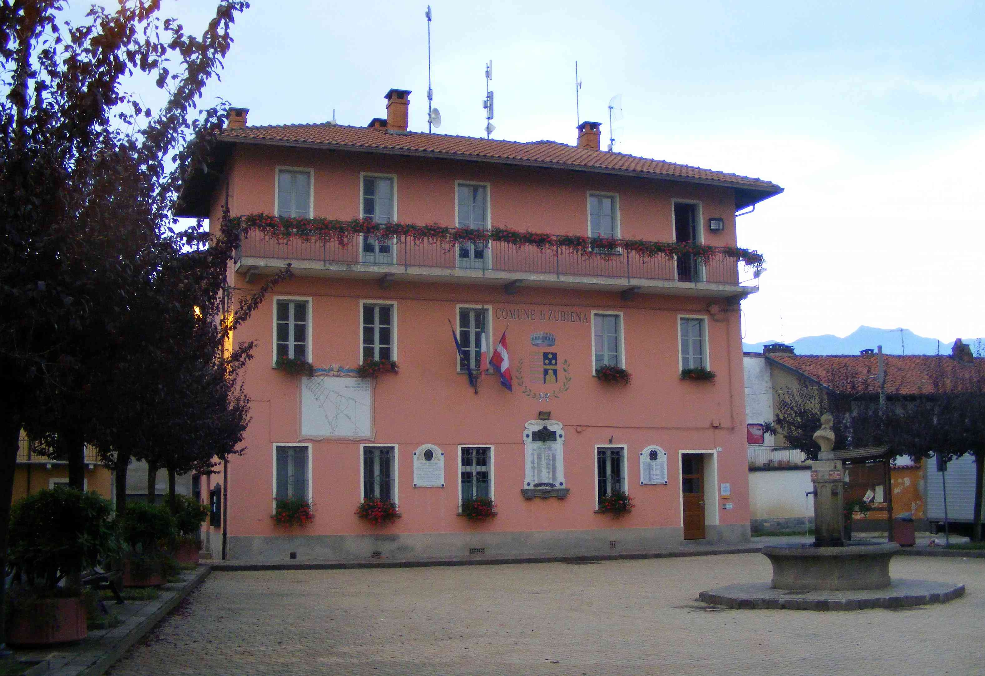 Zubiena (BI): il municipio Unknown